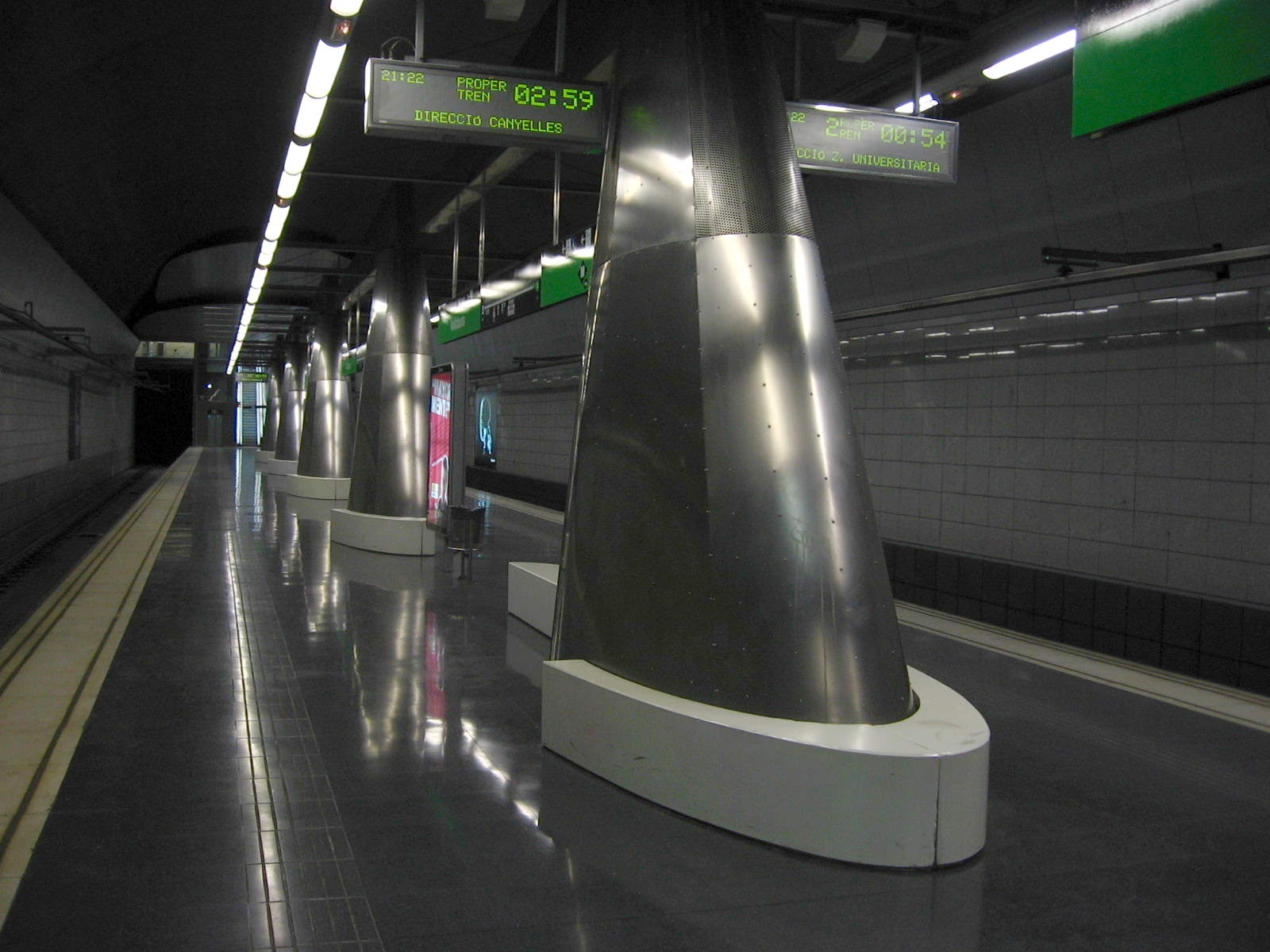 Platform of Valldaura station, Barcelona Metro/Andana de l'estació Valldaura, Barcelona